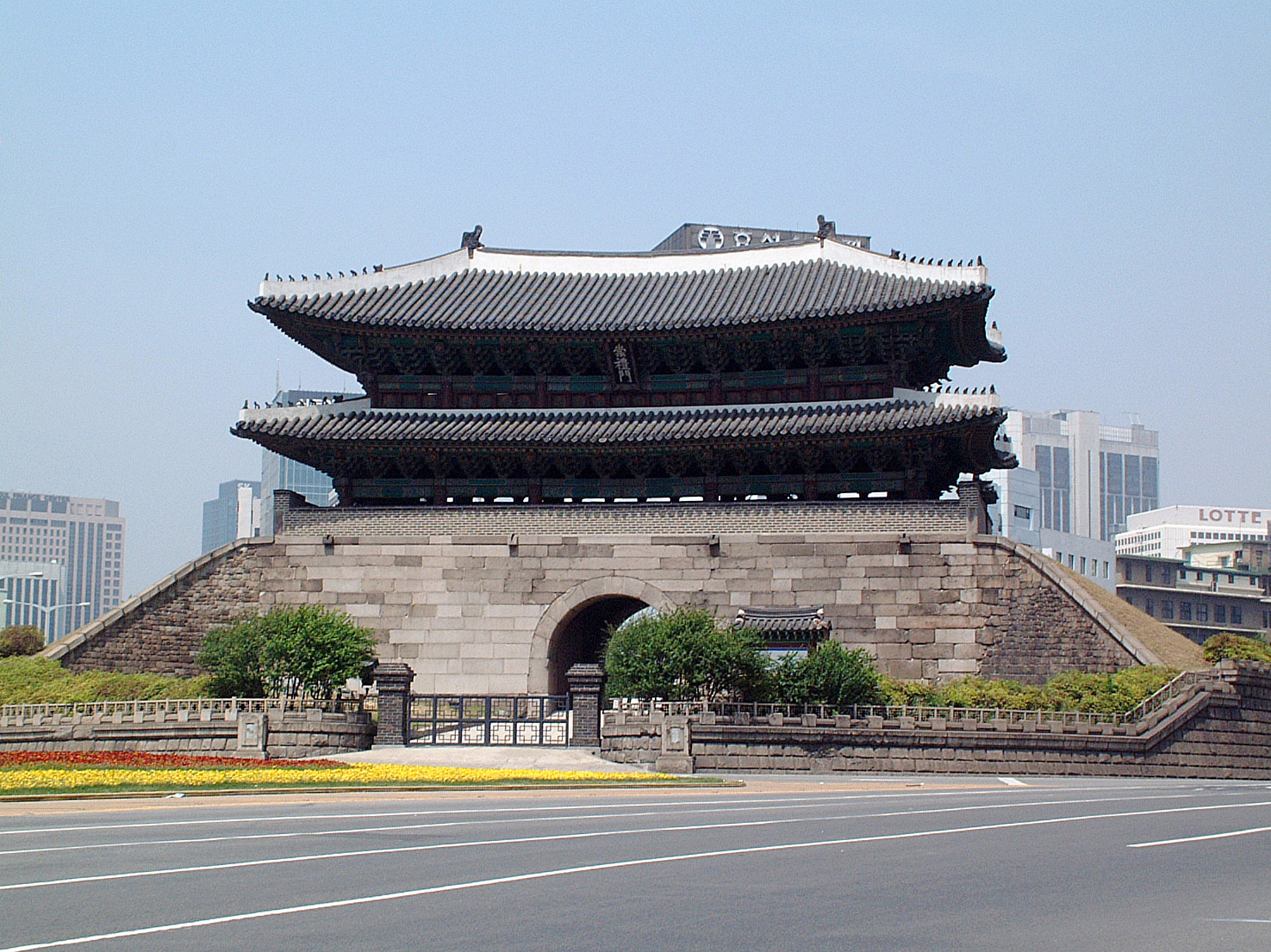 Sungnyemun in Seoul.